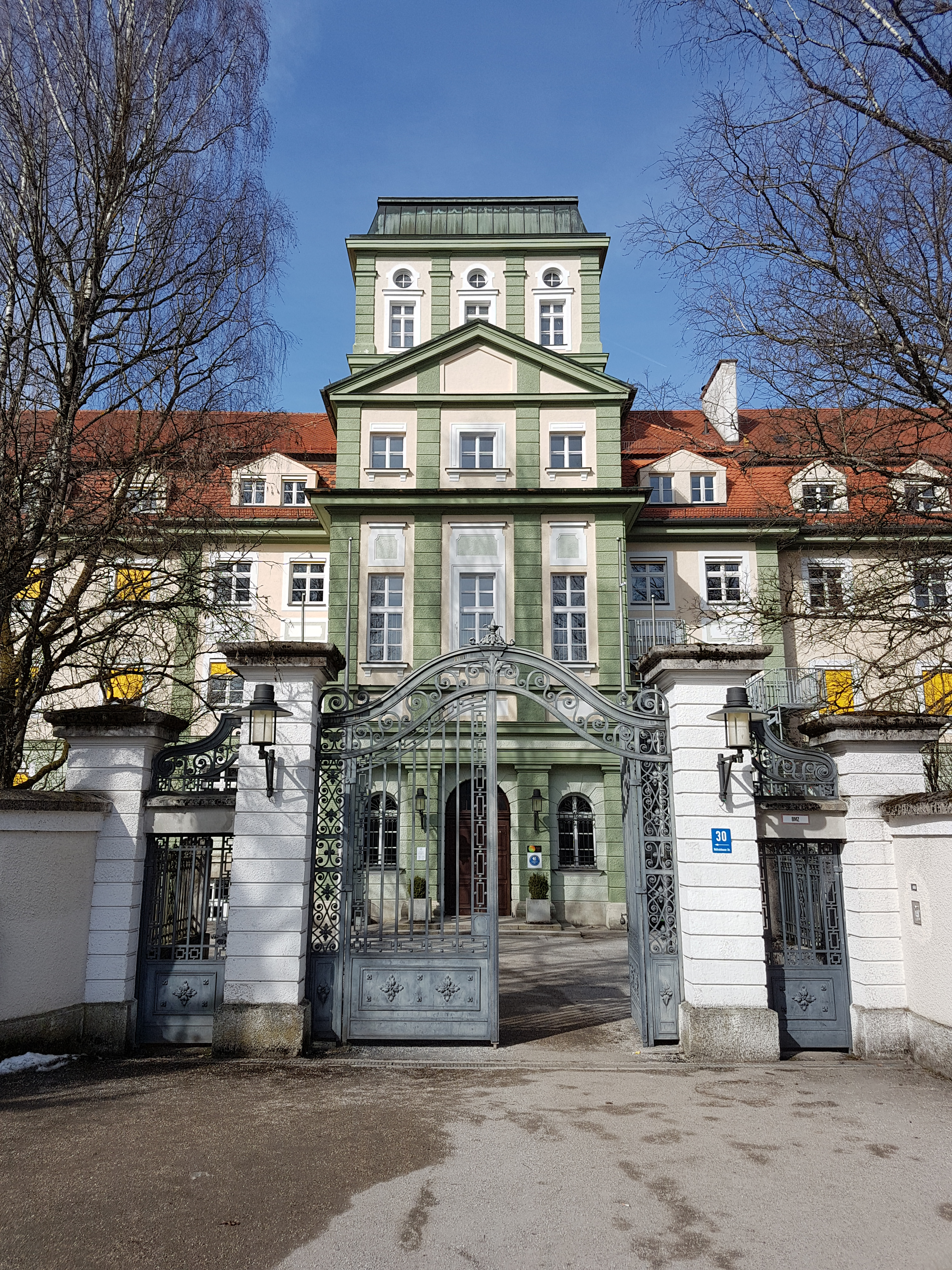 Haupteingang des Erzbischöflichen Pater-Rupert-Mayer-Gymnasium Pullach